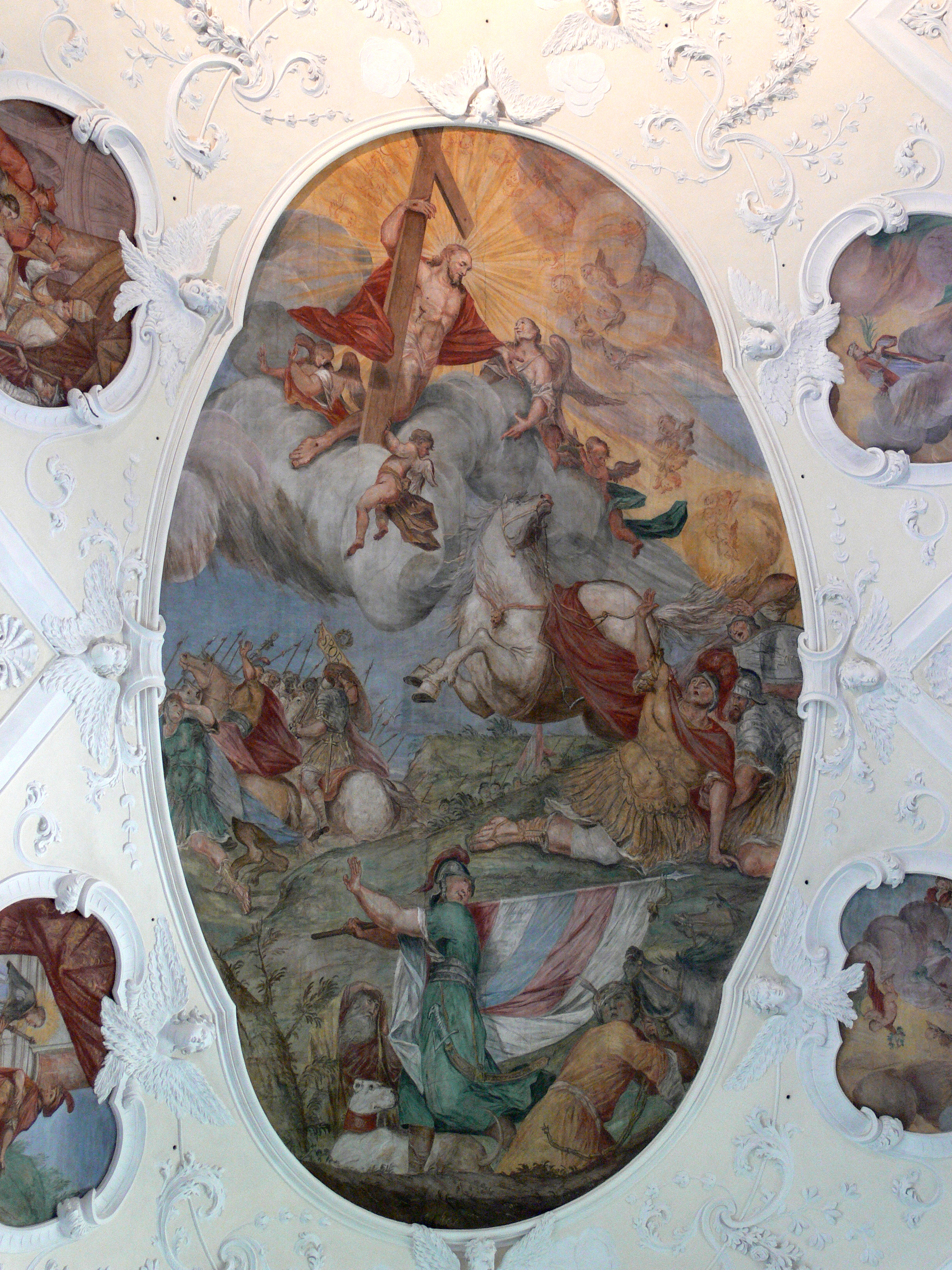 Pfarrkirche St. Peter und Paul und St. Trudpert (ehemalige Klosterkirche des Klosters St. Trupdert), Gemeinde Münstertal, Landkreis Breisgau-Hochschwarzwald Hauptfresko der Langhausdecke: Bekehrung des hl. Paulus vor Damaskus; 1716–1722